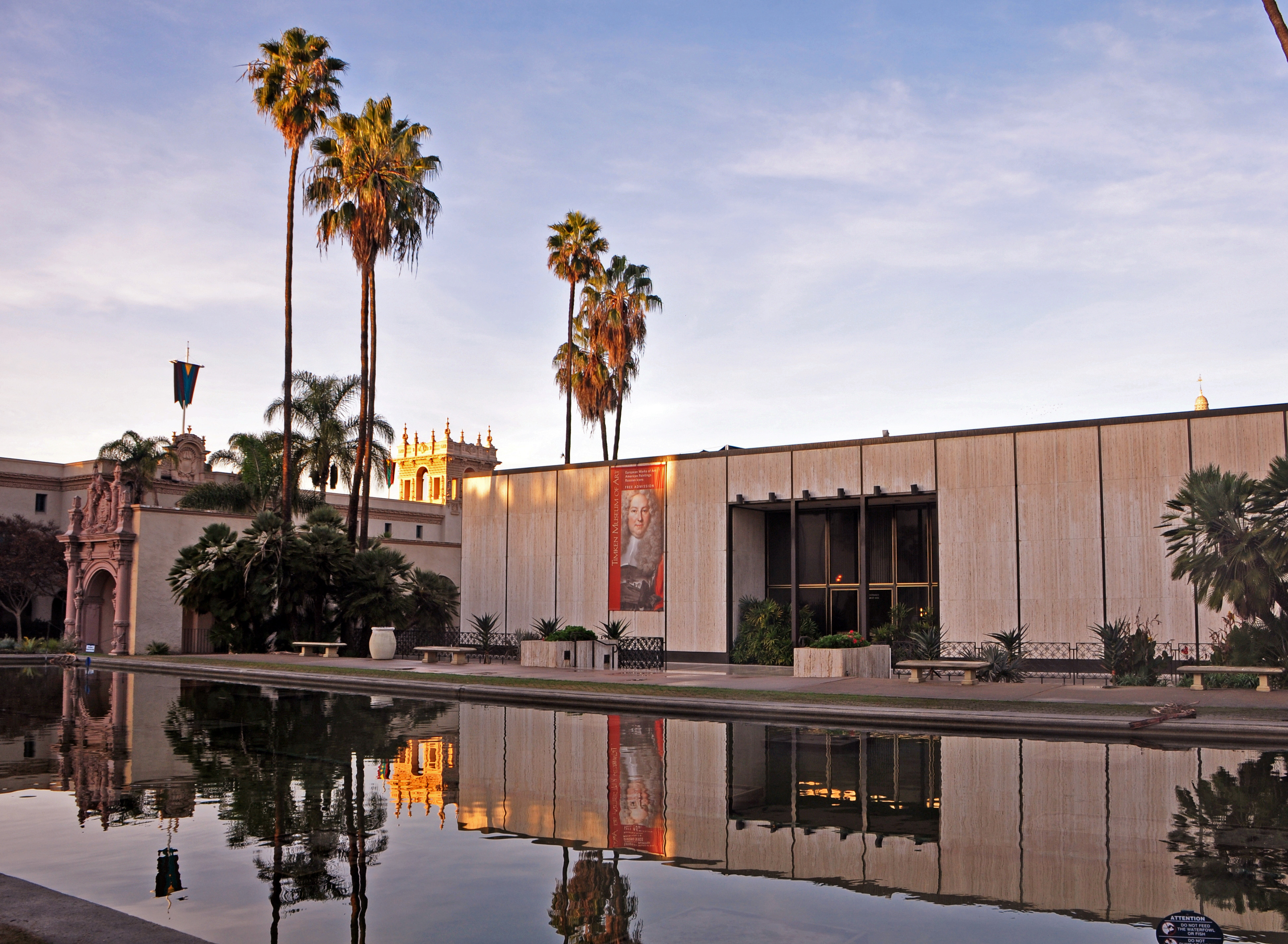 Timken Museum of Art